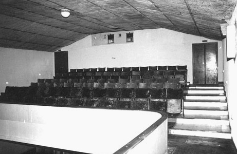 Kursaal - De Balkon 1976